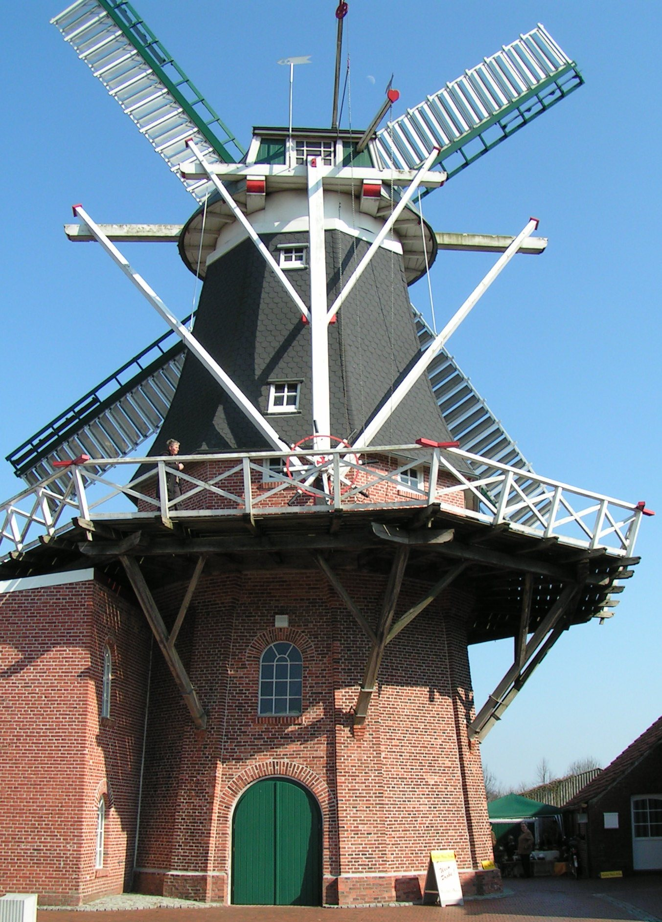 Windmühle (Galerieholländer) in Idafehn (Gemeinde Ostrhauderfehn)